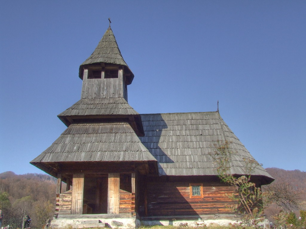 Biserica de lemn din Răstoliţa, judeţul Mureş.